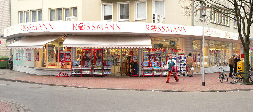 Rossmann-Filiale Hannover Gretchenstraße/Lister Meile